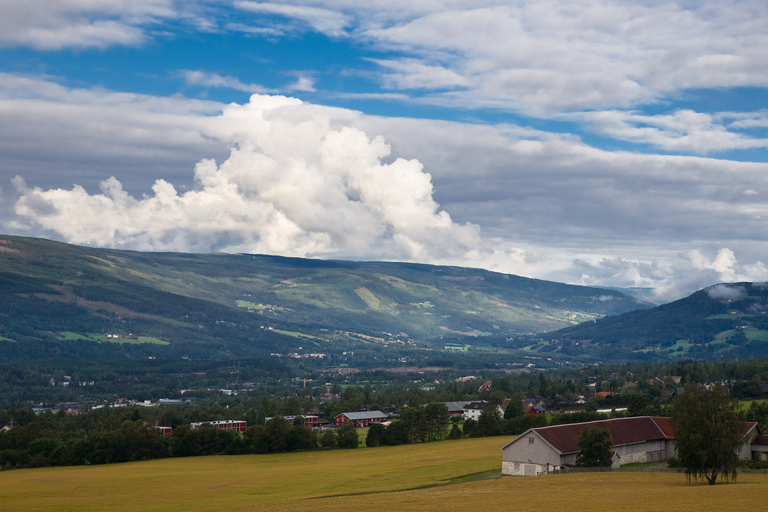 Lillehammer, Norway. Lysgård farm near Lysgård ski jump, looking west/northwest to Gausdal.